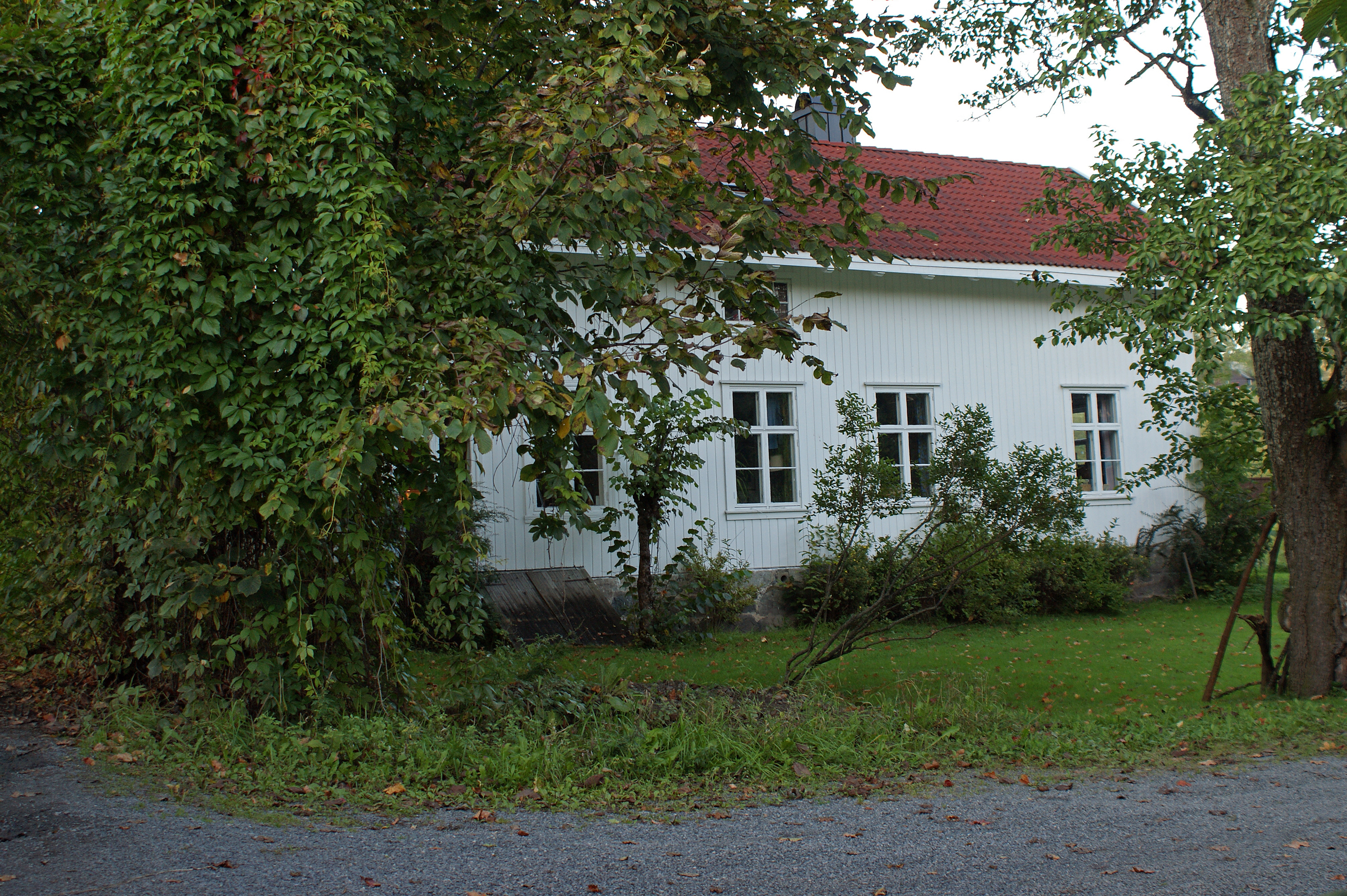 Økri skole var en av de første faste skolene i Bærum. Innviet 1866. Nedlagt 1901 da Skui skole stod klar. Bildet er tatt i 2011